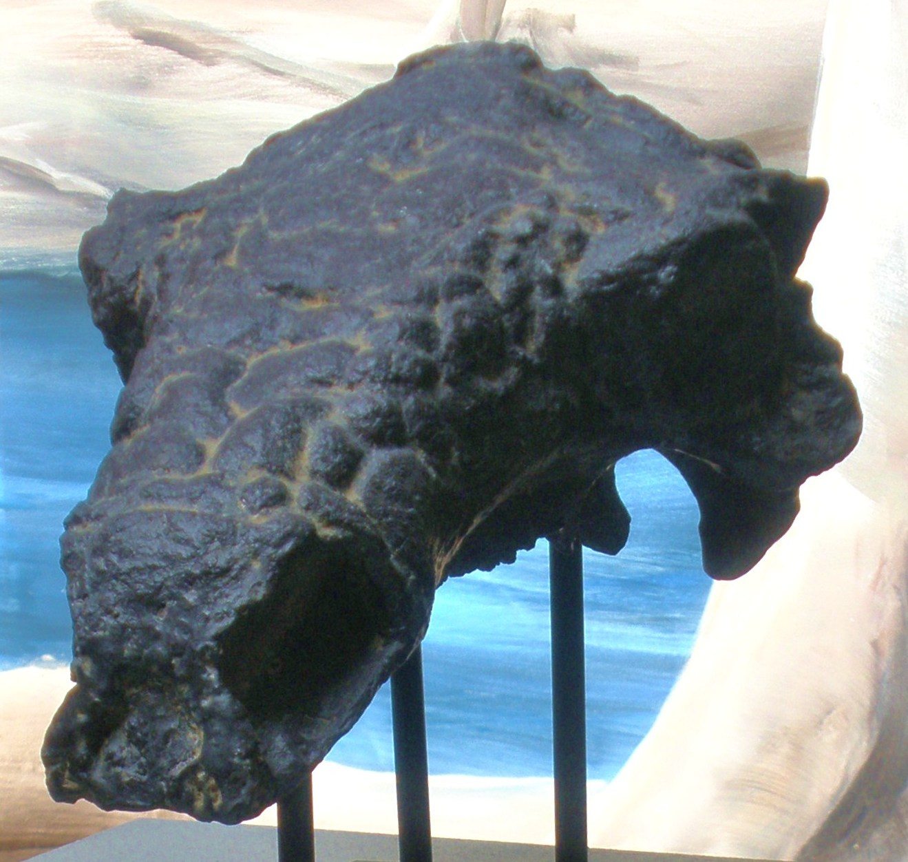 Fossil Pawpawsaurus